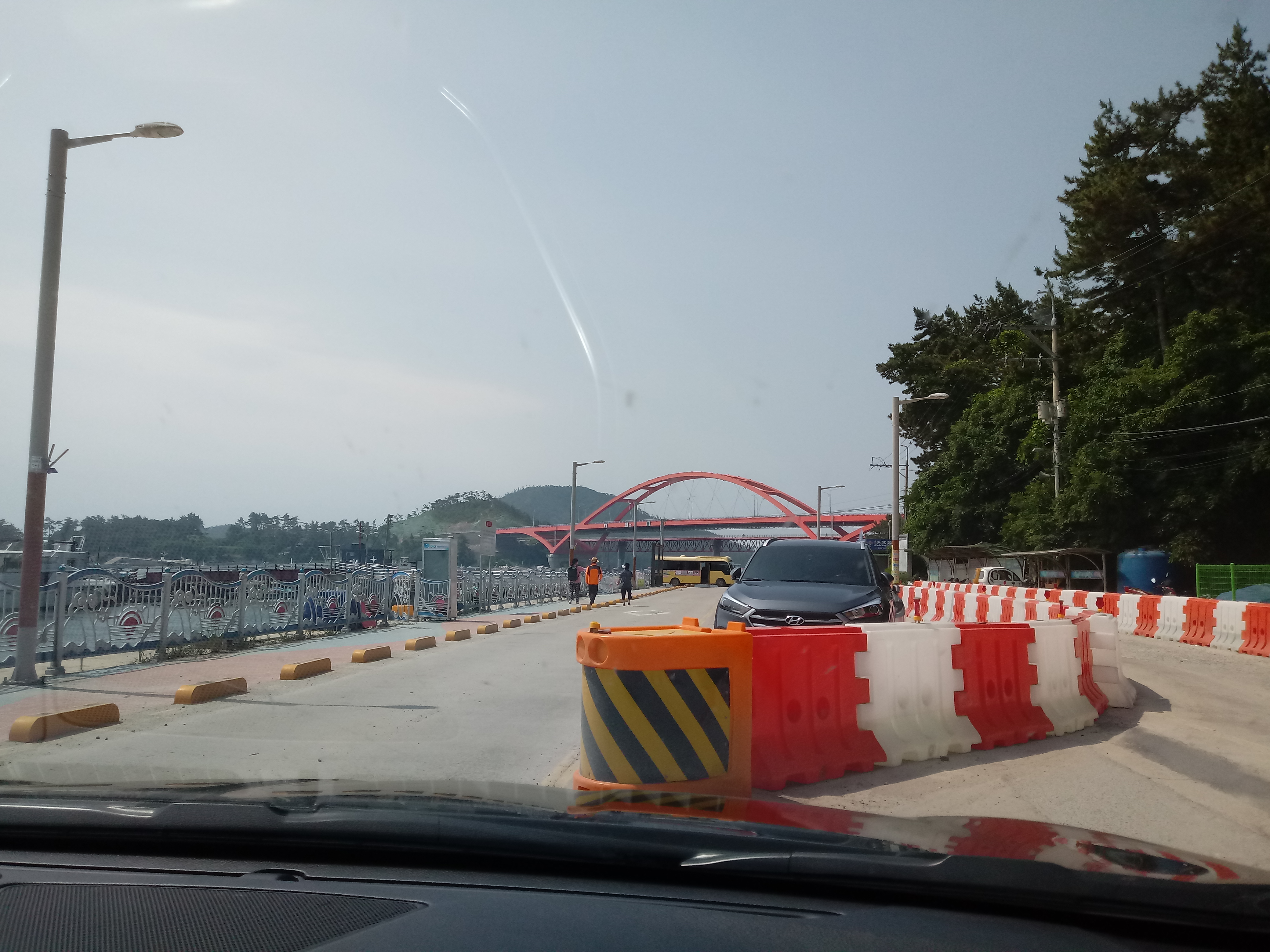 전북 군산시의 선유교